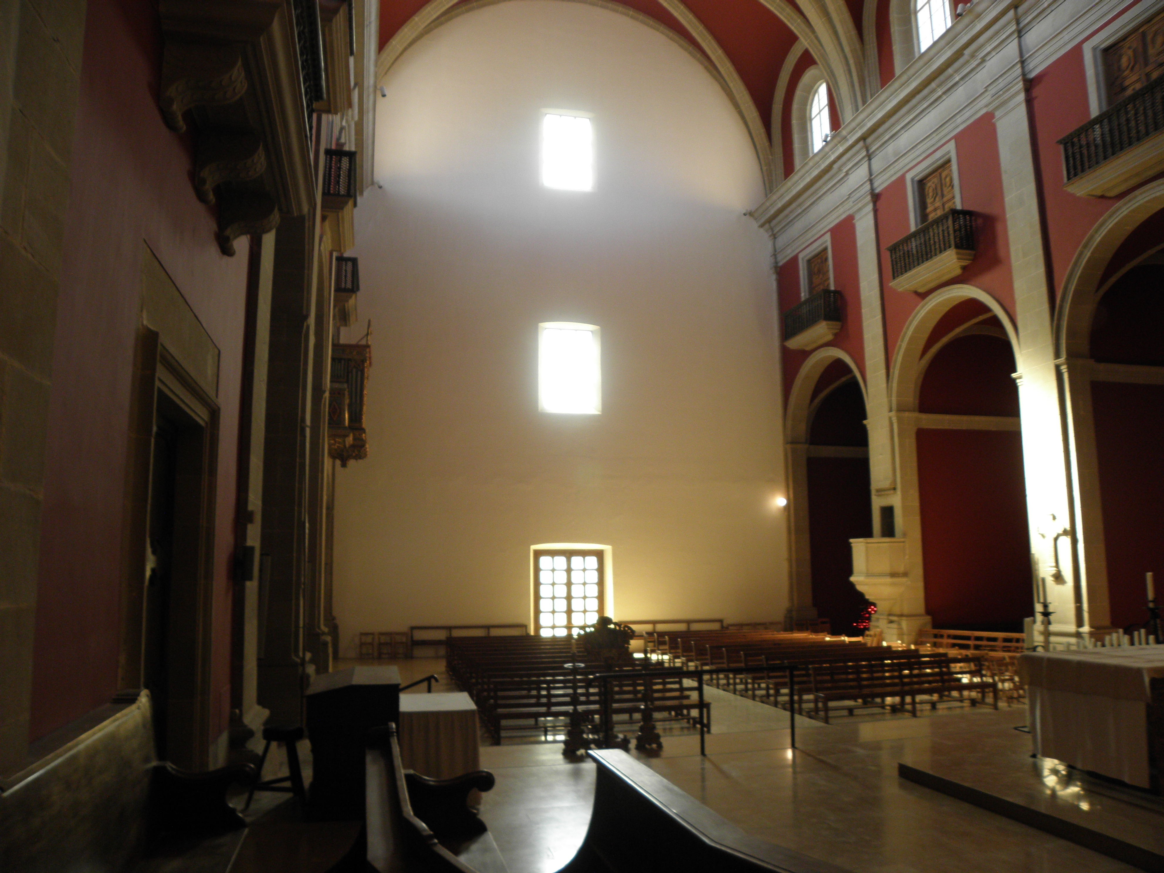 Interior de l'església del Santuari del Miracle (Riner, Solsonès)